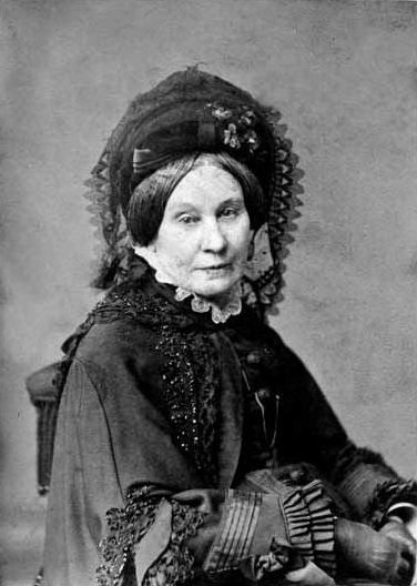 София Шуазёль-Гуфье, ур. Тизенгаузен (1790—1878)